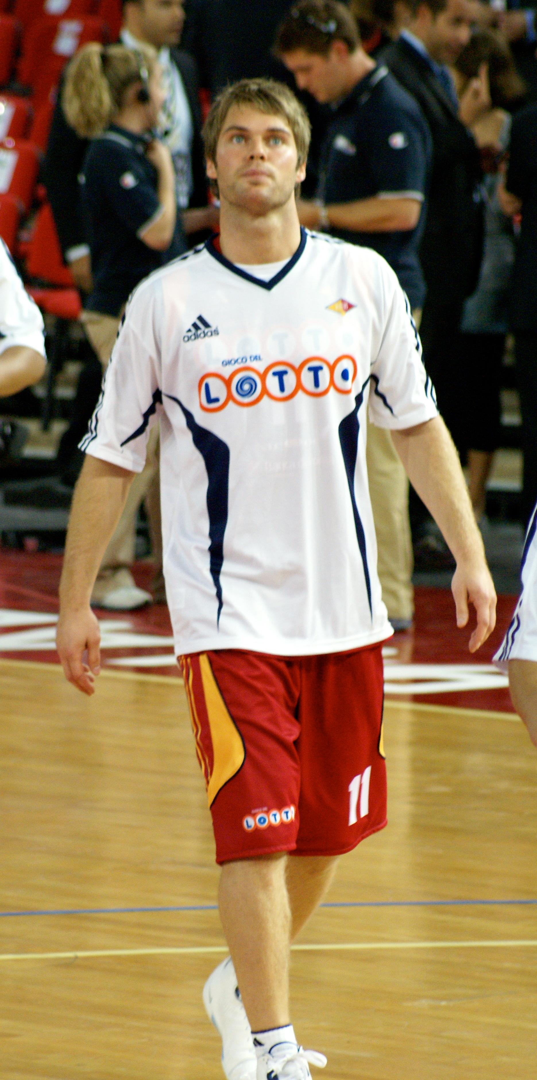 Jón Stefánsson